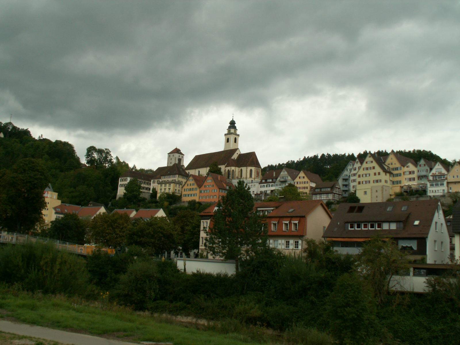 Horb am Neckar